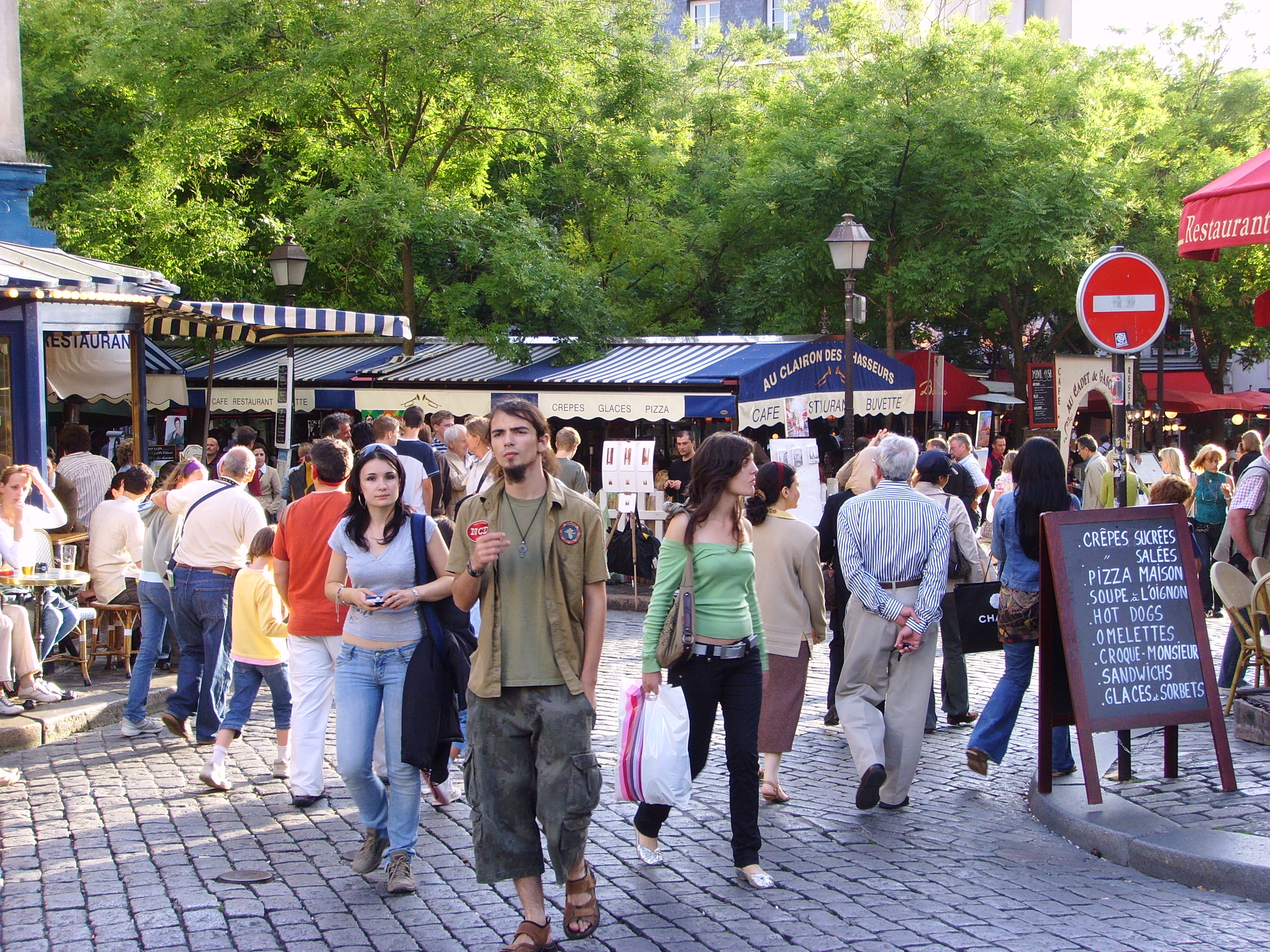 Square in Montmartre, Paris